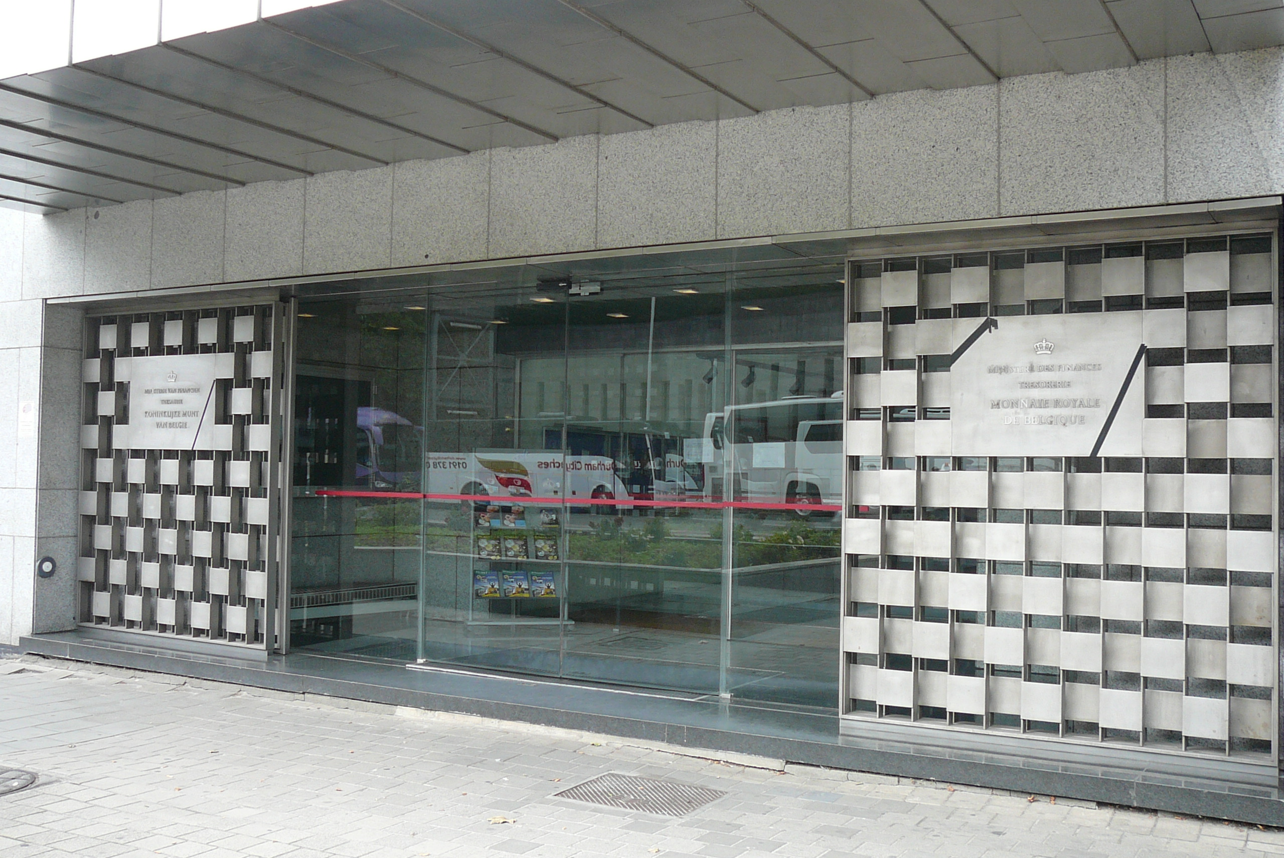 Entrée de l'immeuble de la Monnaie royale de Belgique, à Bruxelles, Belgique